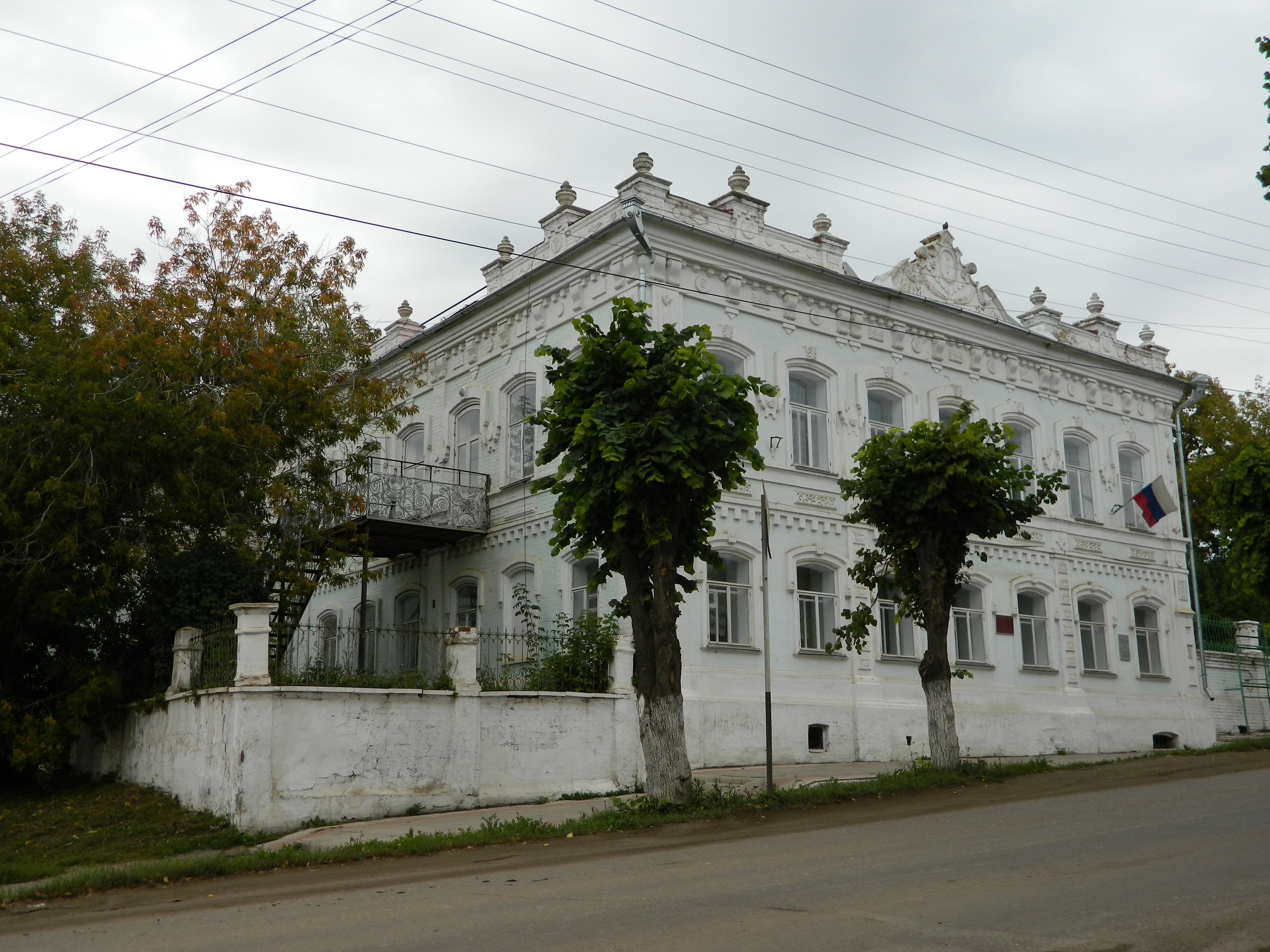 Усадьба: улица Советская, 31, Уржум, Уржумский район, Кировская область